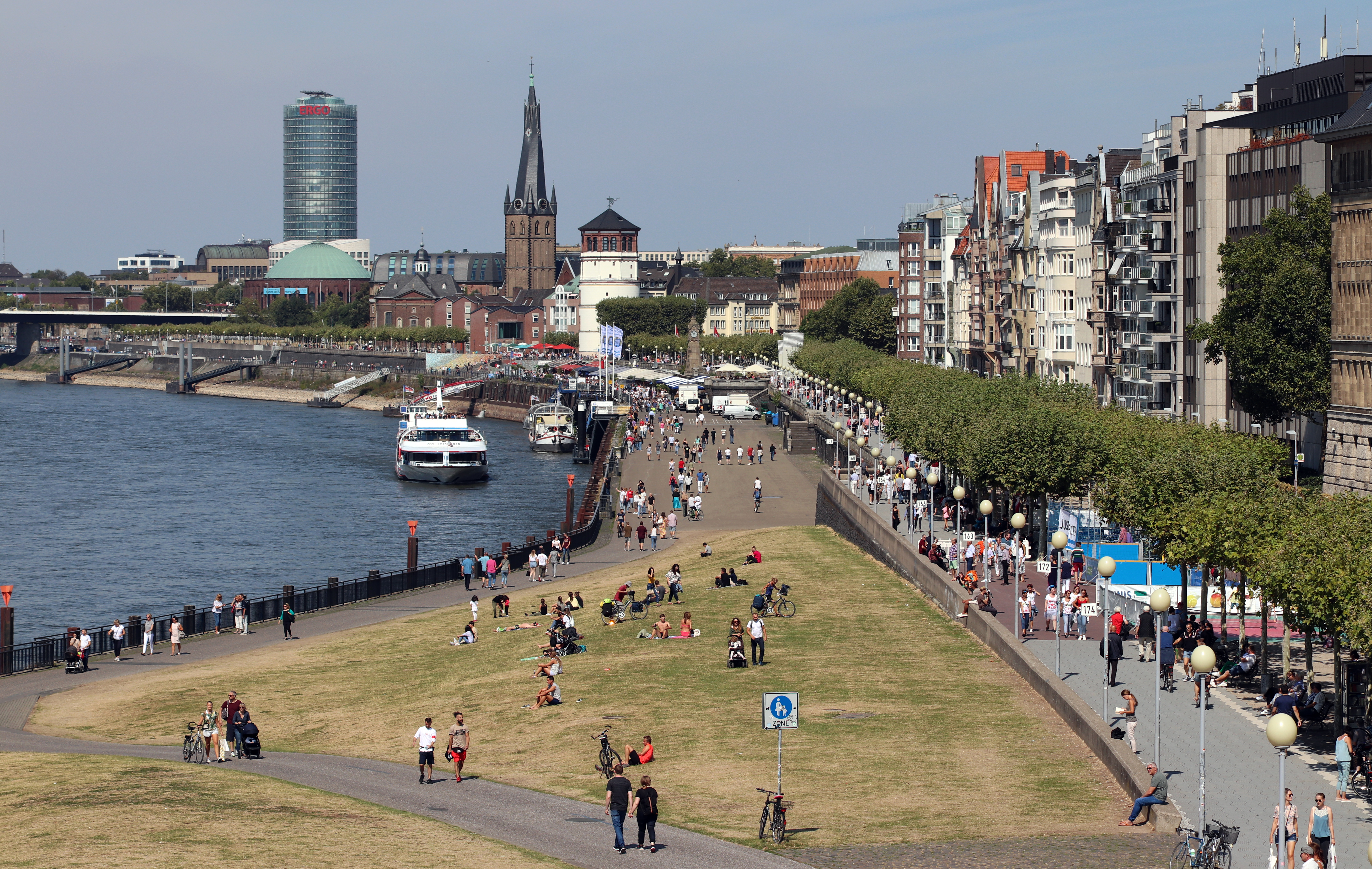 Düsseldorf Rheinuferpromenade, aufgenommen von der Rheinkniebrücke